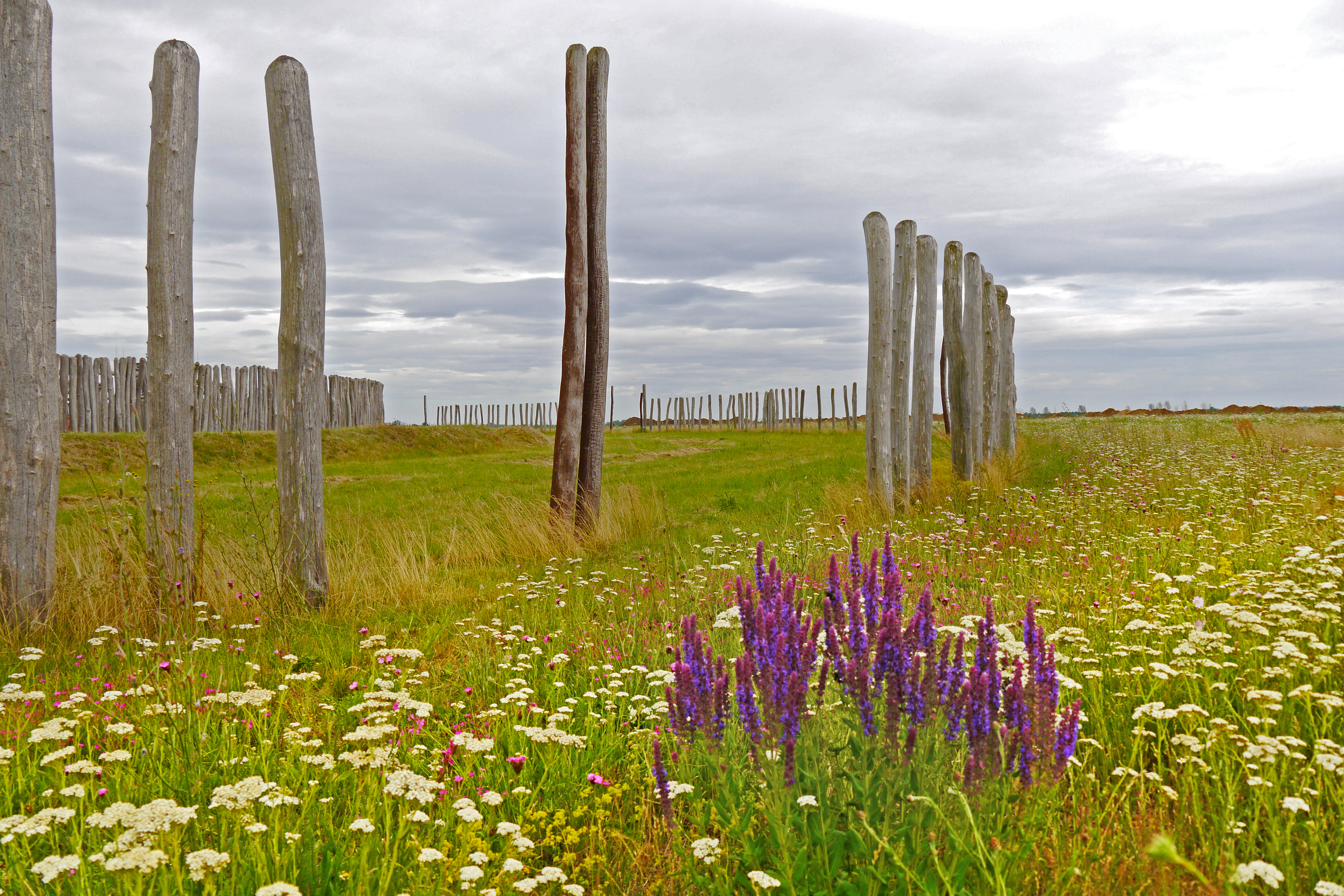 Ringheiligtum Pömmelte im Sommer